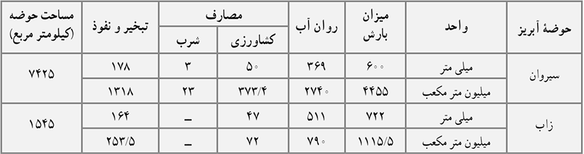 Vazeyeite Hozeh